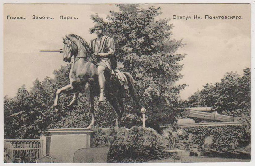 Беларуская (тарашкевіца): Гомель (Homiel), помнік Юзэфу Панятоўскаму (Juzef Paniatoŭski)